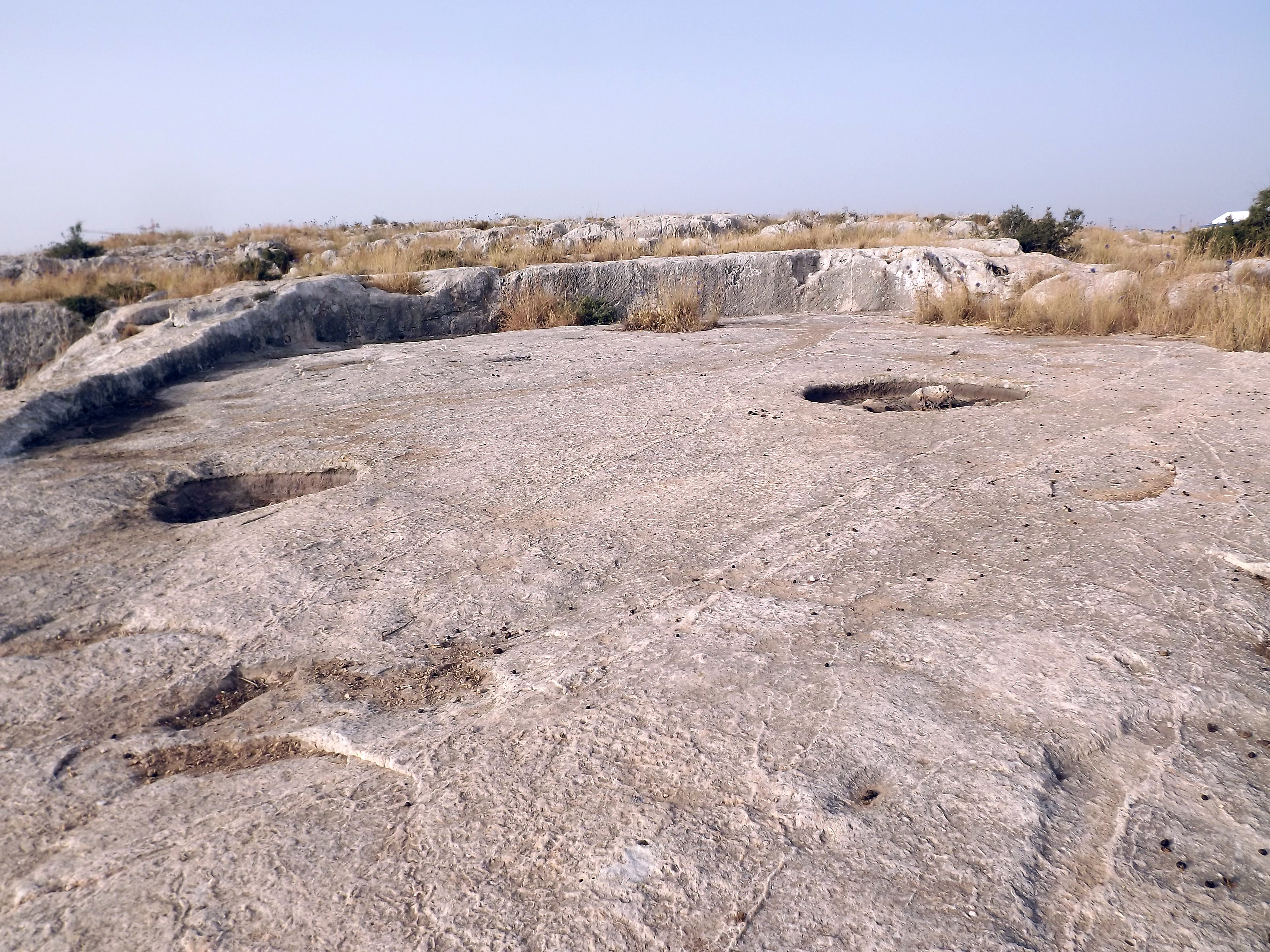 הגורן באתר גתות ברקן